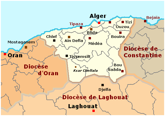 Localisation du diocèse catholique d'Alger, Algérie.